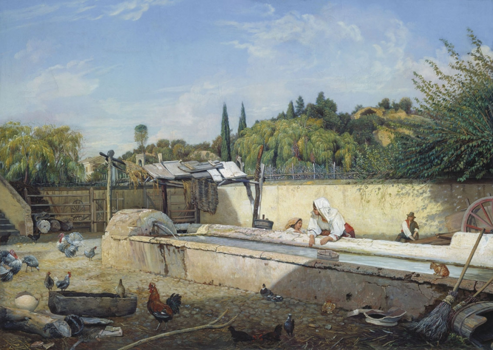 Кабанов Иван Андреевич (1823-1869). Терраса в окрестностях Рима (1850-1860-е годы). Холст, масло.